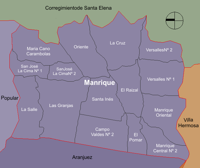 mapa de la división barrial de la comuna Manrique. Medellín, Colombia.